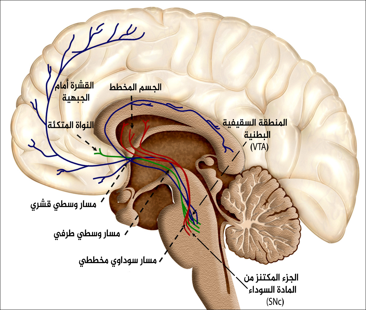 نظرة عامة على بنية المكافأة في الدماغ البشري، تتواجد العصبونات دوبامينية الفعل في بُنيتي بالدماغ الأوسط هما المادة السوداء والمنطقة السقيفية البطنية. تمتد محوارات عصبونات هاتين المنطقتين إلى الجسم المخطط ( النواة الذنبية، البطامة والجسم المخطط البطني بما في ذلك النواة المتكئة)، وإلى القشرة أمام الجبهية الظهرية والبطنية.من البنى الدماغية الأخرى التي تتأثر بالمكافأة: منطقة الحركة الإضافية في الفص الجبهي، القشرة الأنفية في الفص الصدغي، الكرة الشاحبة ونواة تحت المهاد في العقد القاعدية، بالإضافة إلى عدة بنى أخرى.